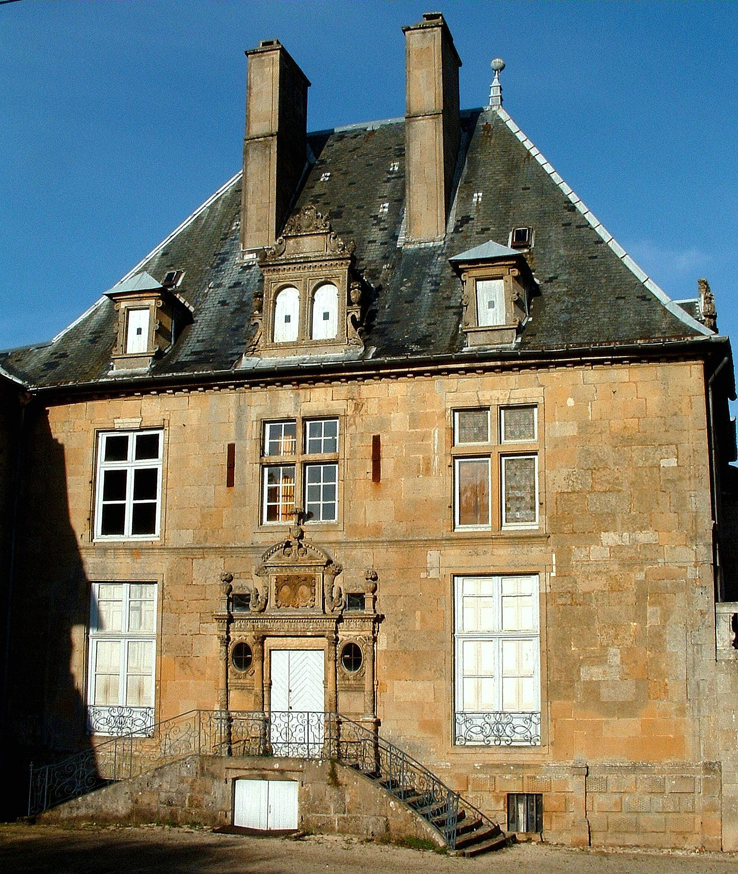 Langres - Hôtel du Breuil-de-Saint-Germain